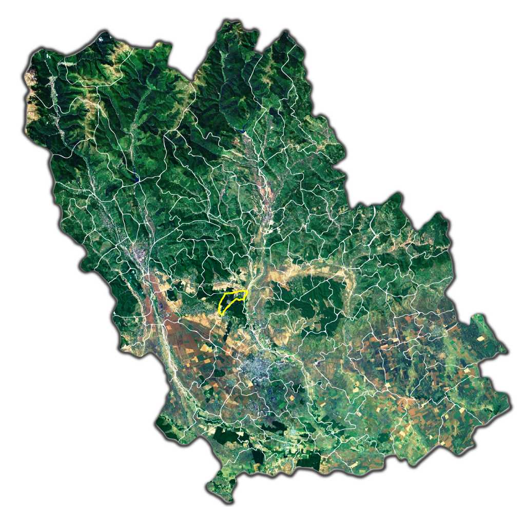 Plopeni jud Prahova.